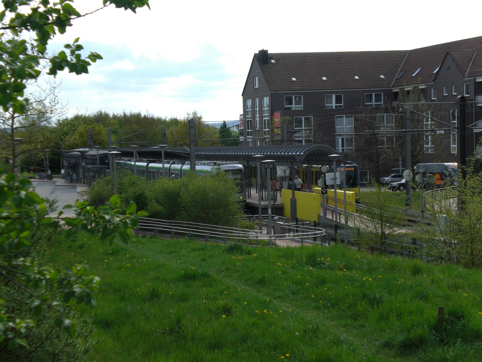 Hannover-Wettbergen: Endpunkt der Straßenbahnlinien 3 und 7